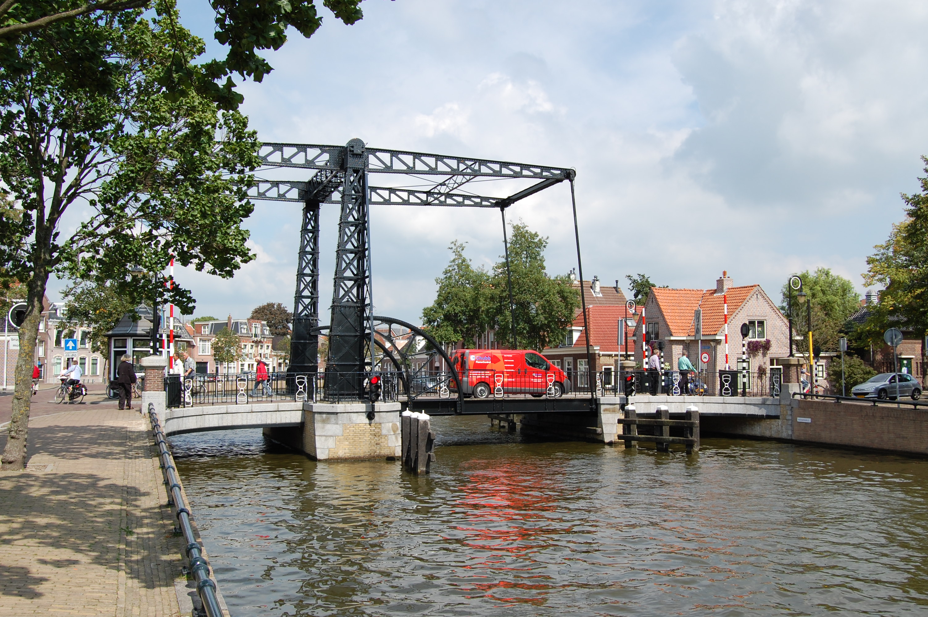 De Harinxmabrug in de Stadsgracht van Sneek.